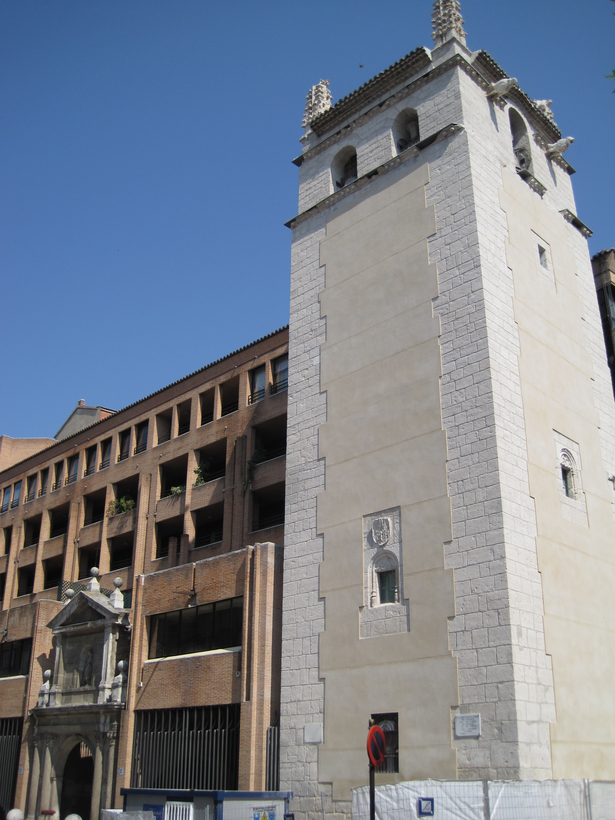 Vista parcial de la iglesia de San Lorenzo, en Valladolid (España).